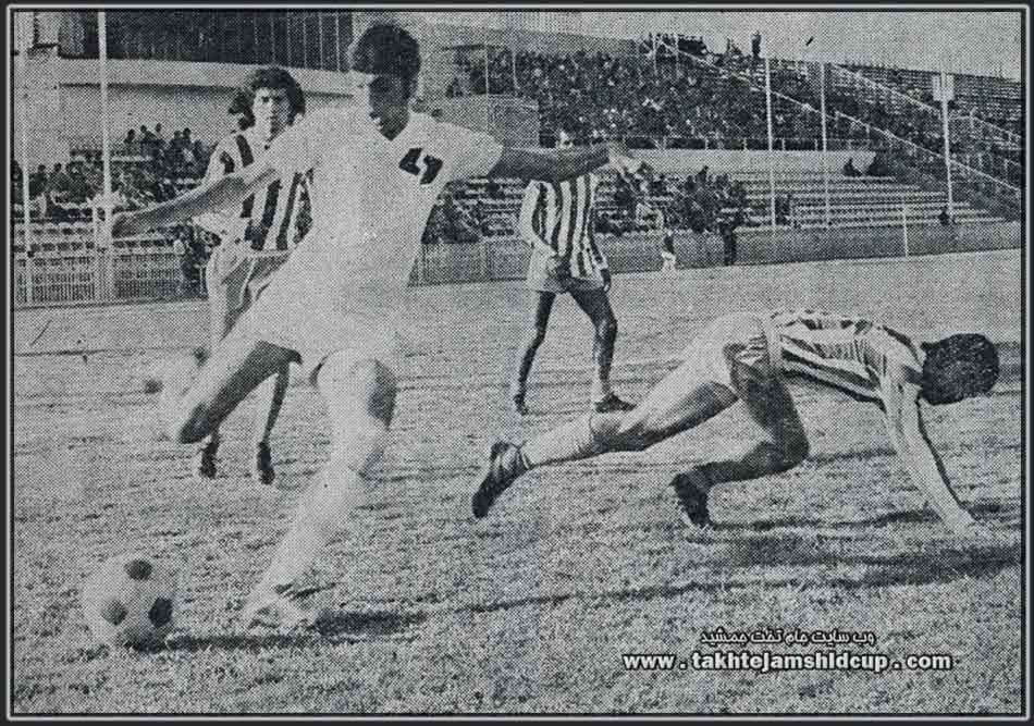 امیر حاج رضایی در حال بازی با پیراهن برق